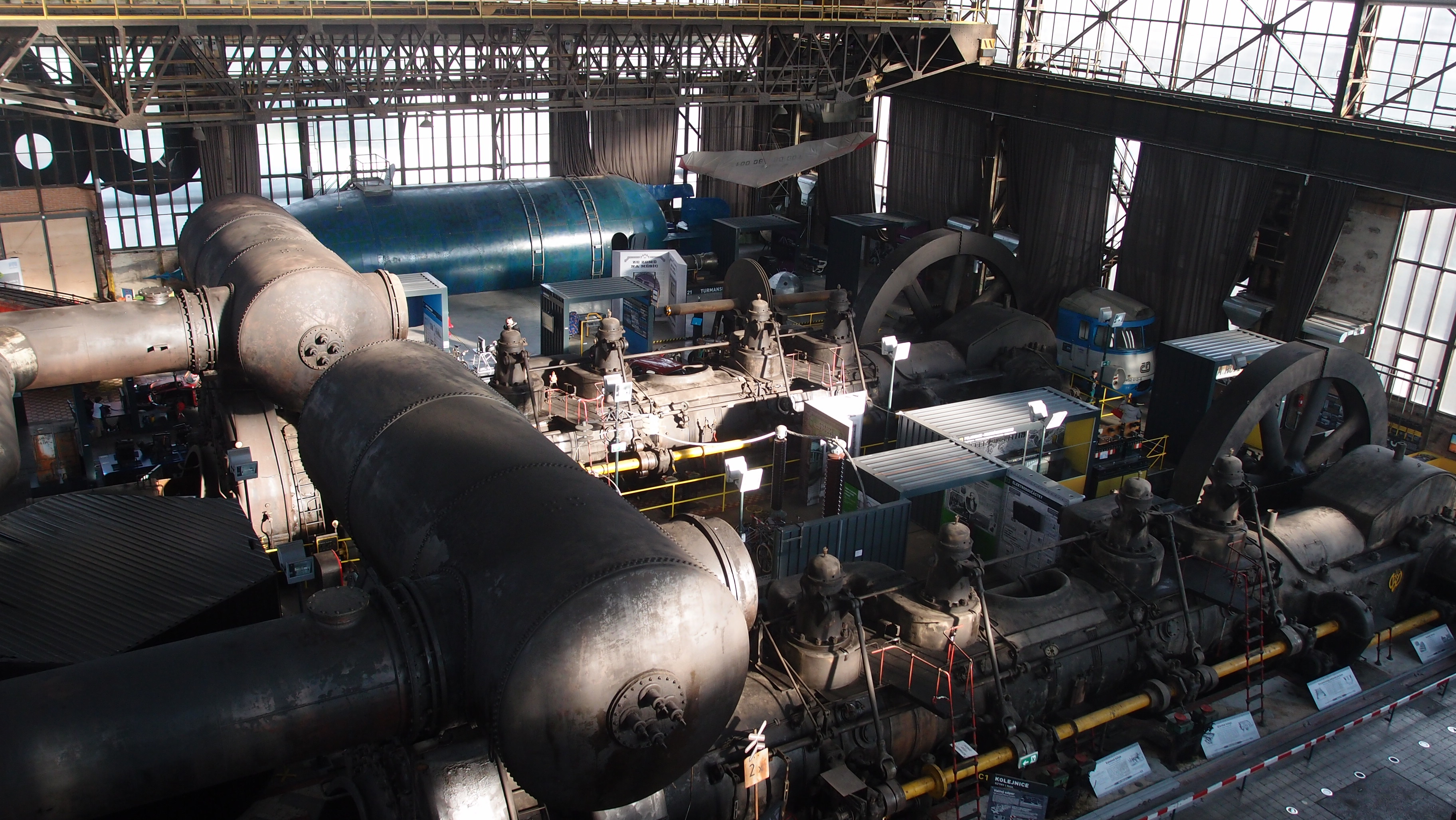 Pohled do expozice Malého světa techniky U6.